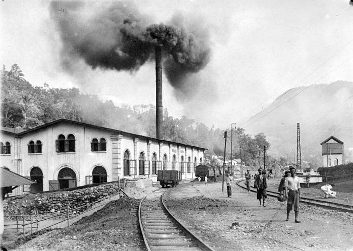 Repronegatief. Kantoor der Ombillinmijnen